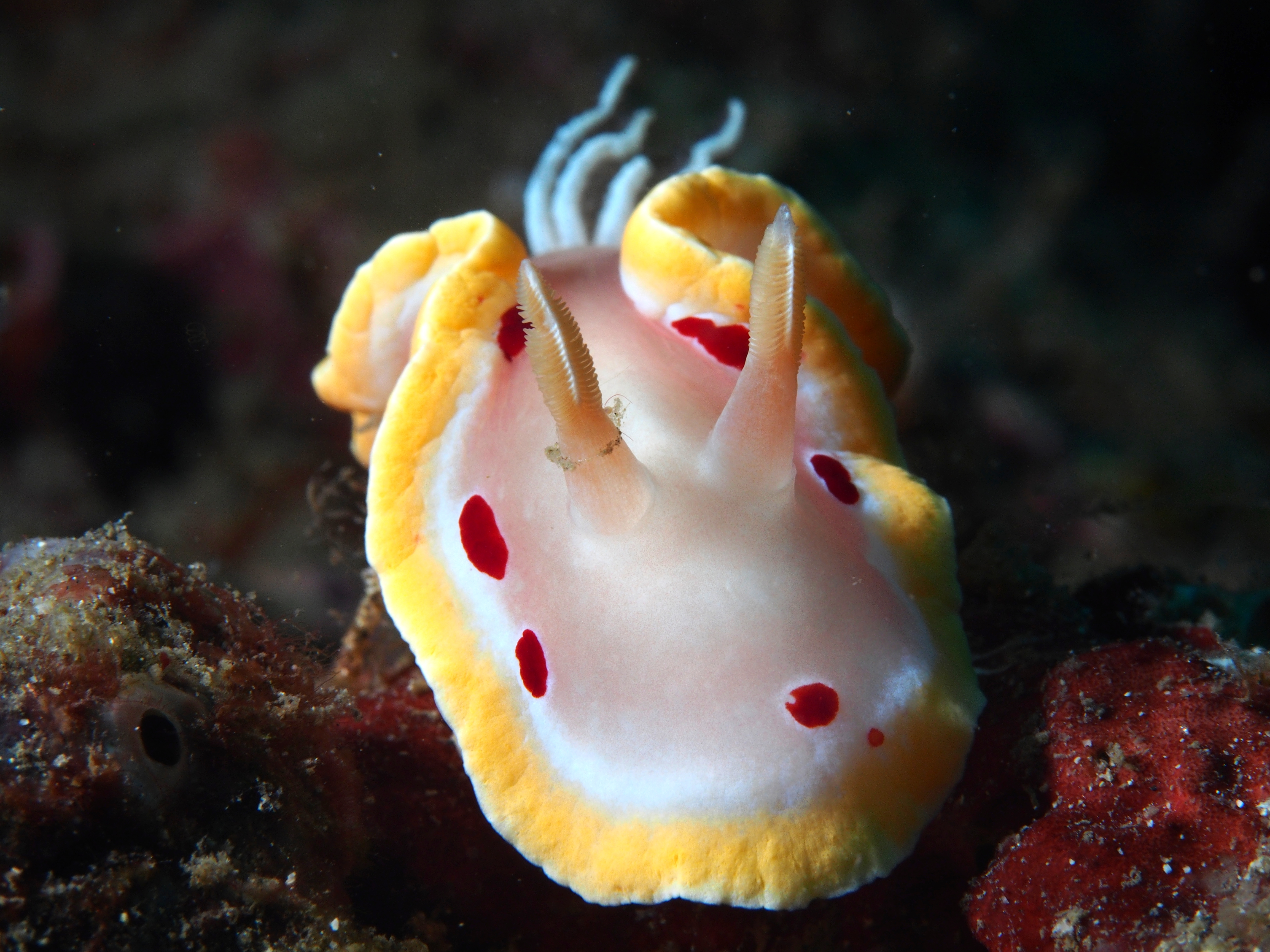 Ardeadoris cruenta, Lembeh, Indonesia